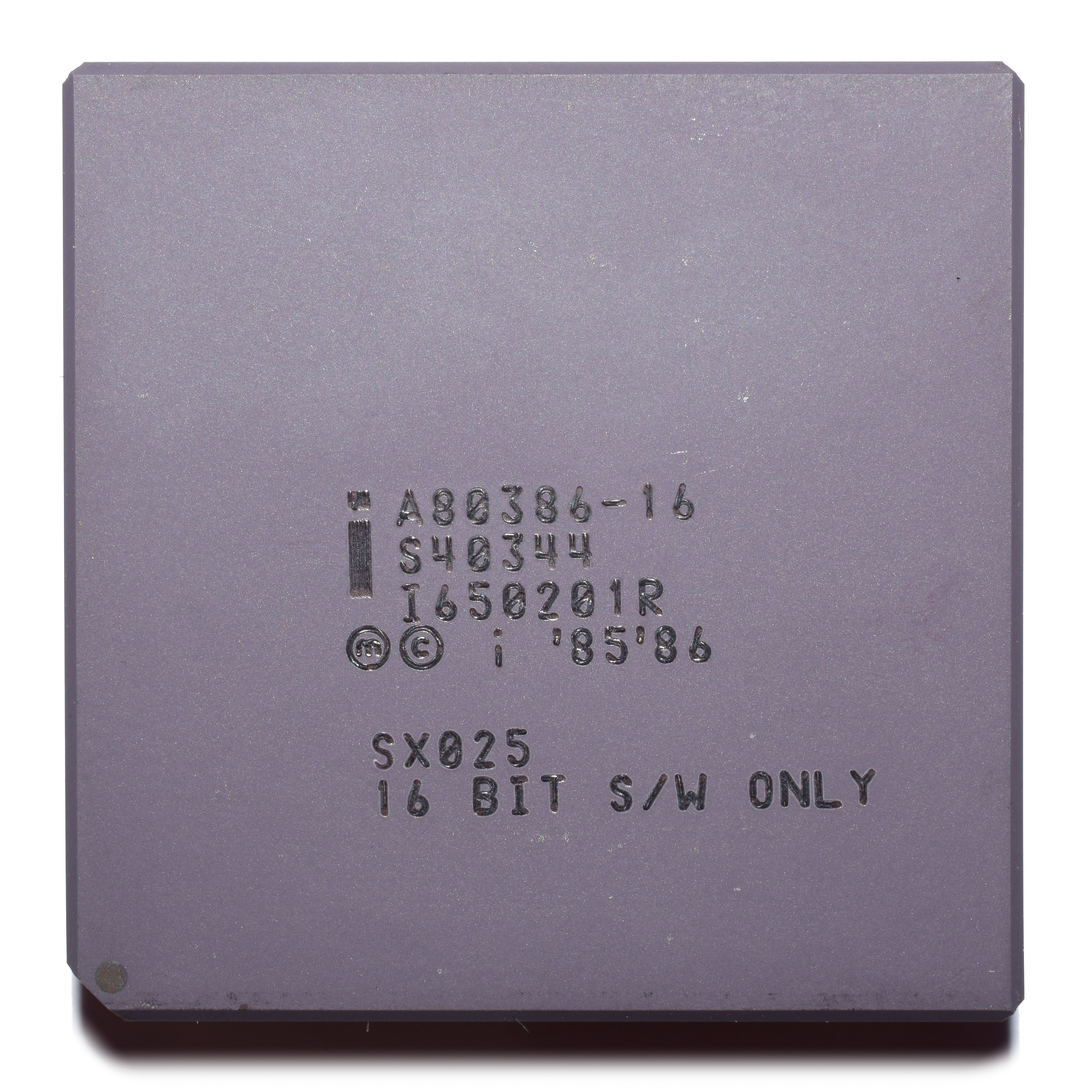 Procesoro Intel A80386-16 kun "16 BIT S/W ONLY" teksto.